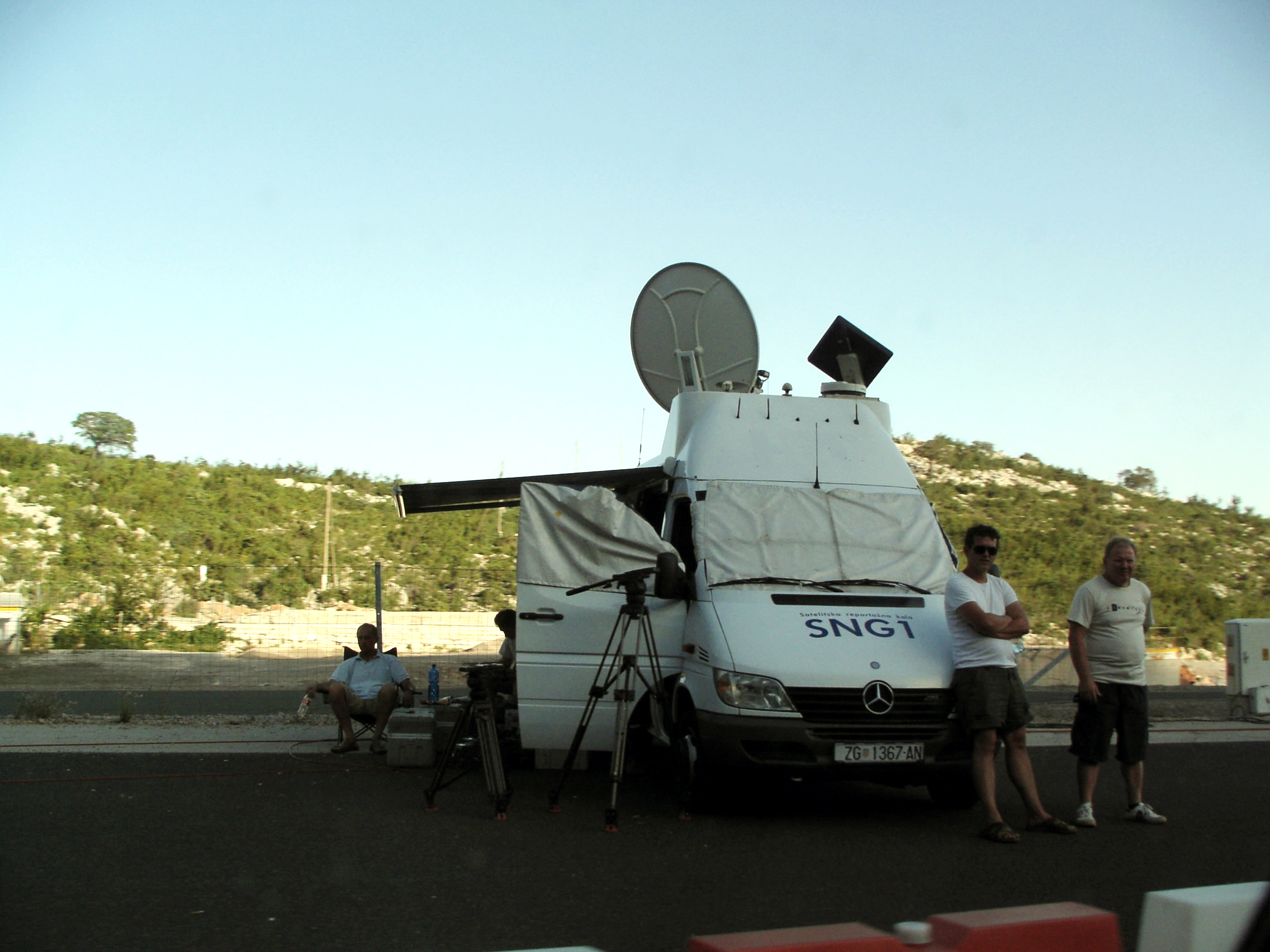 Wóz reporterski satelitarny chorwackiej telewizji HRT